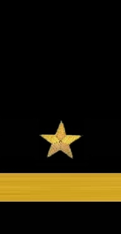 Знаки различия "Капитана 1-го ранга" (OF5) ком. сост. флота (1935-1940), нарукавные знаки различия.